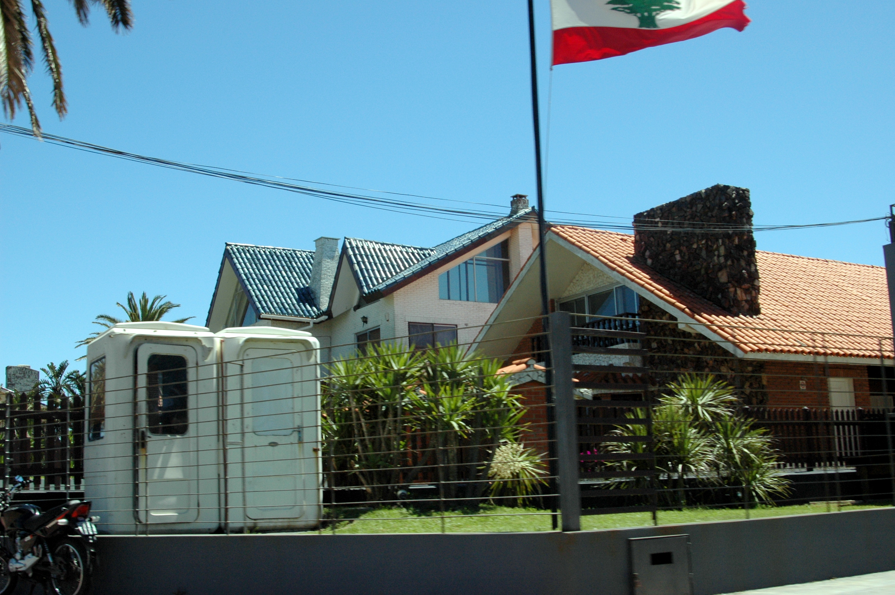 Embajada en Carrasco vista desde Rambla Republica de Mexico